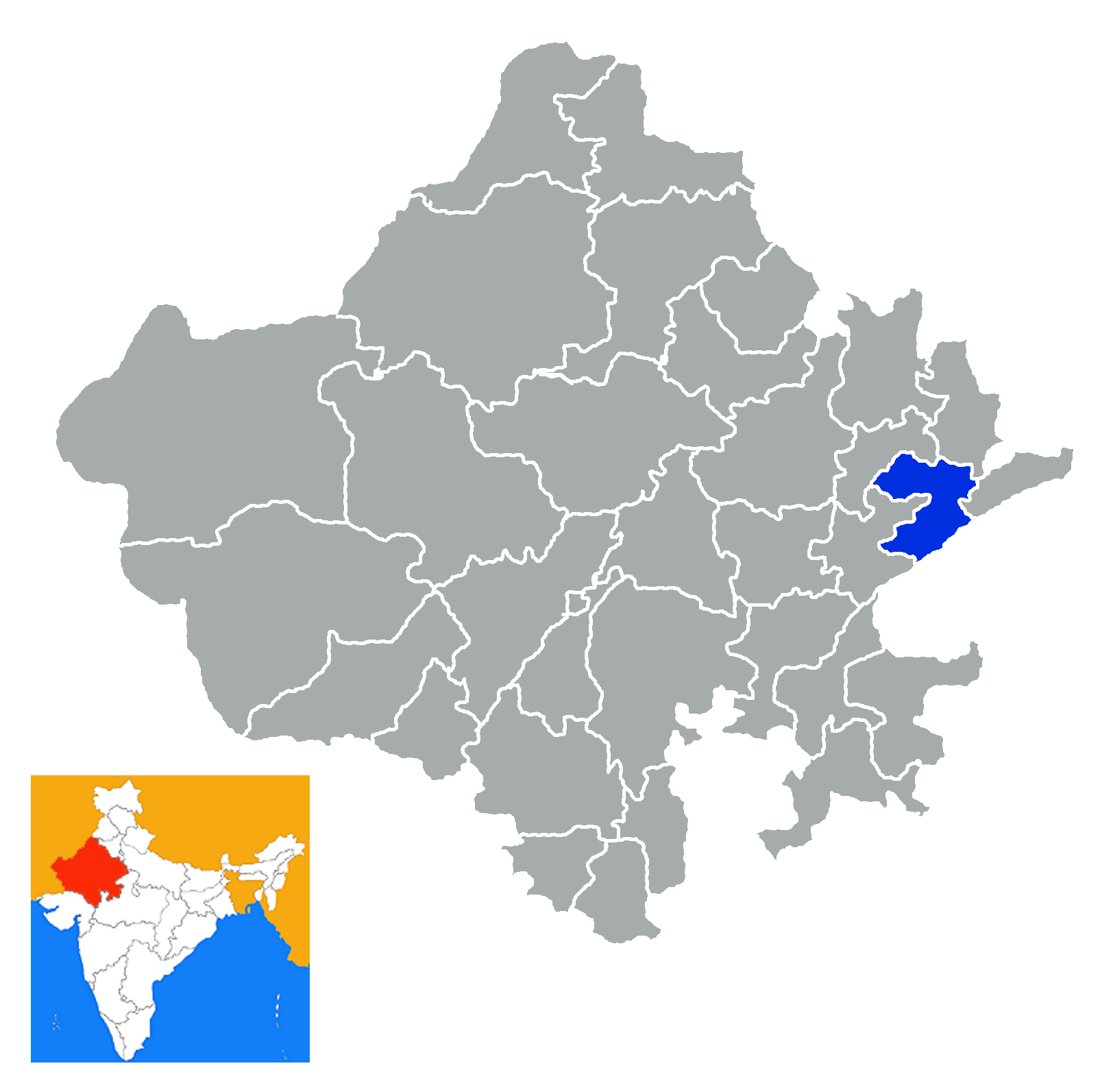 Distrito de Karauli Rajastan India